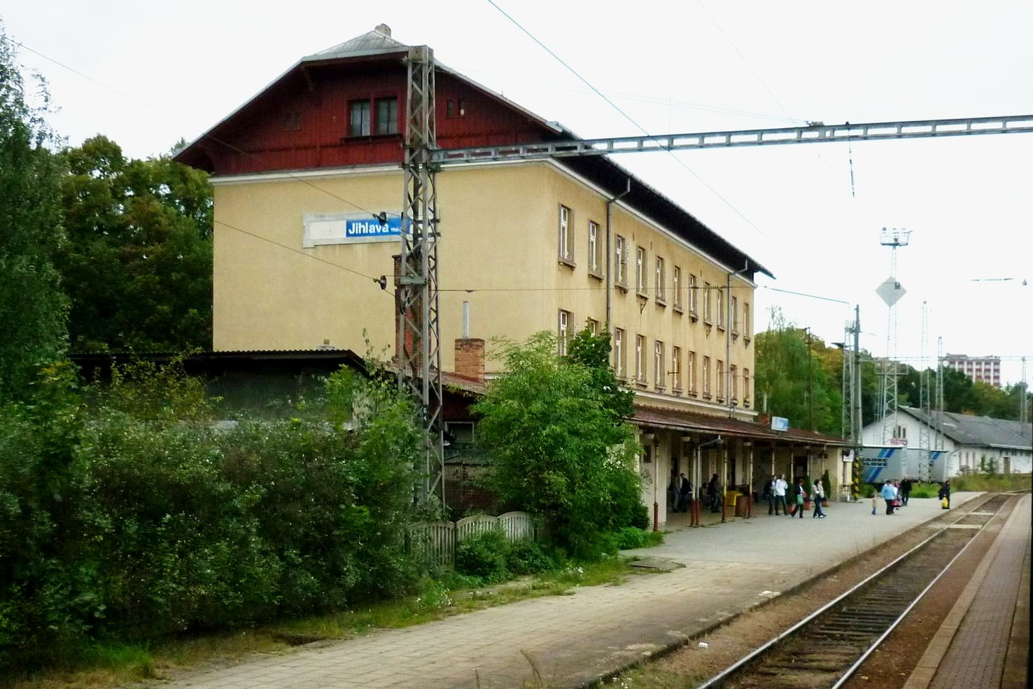 Jihlava město - nádraží ČD